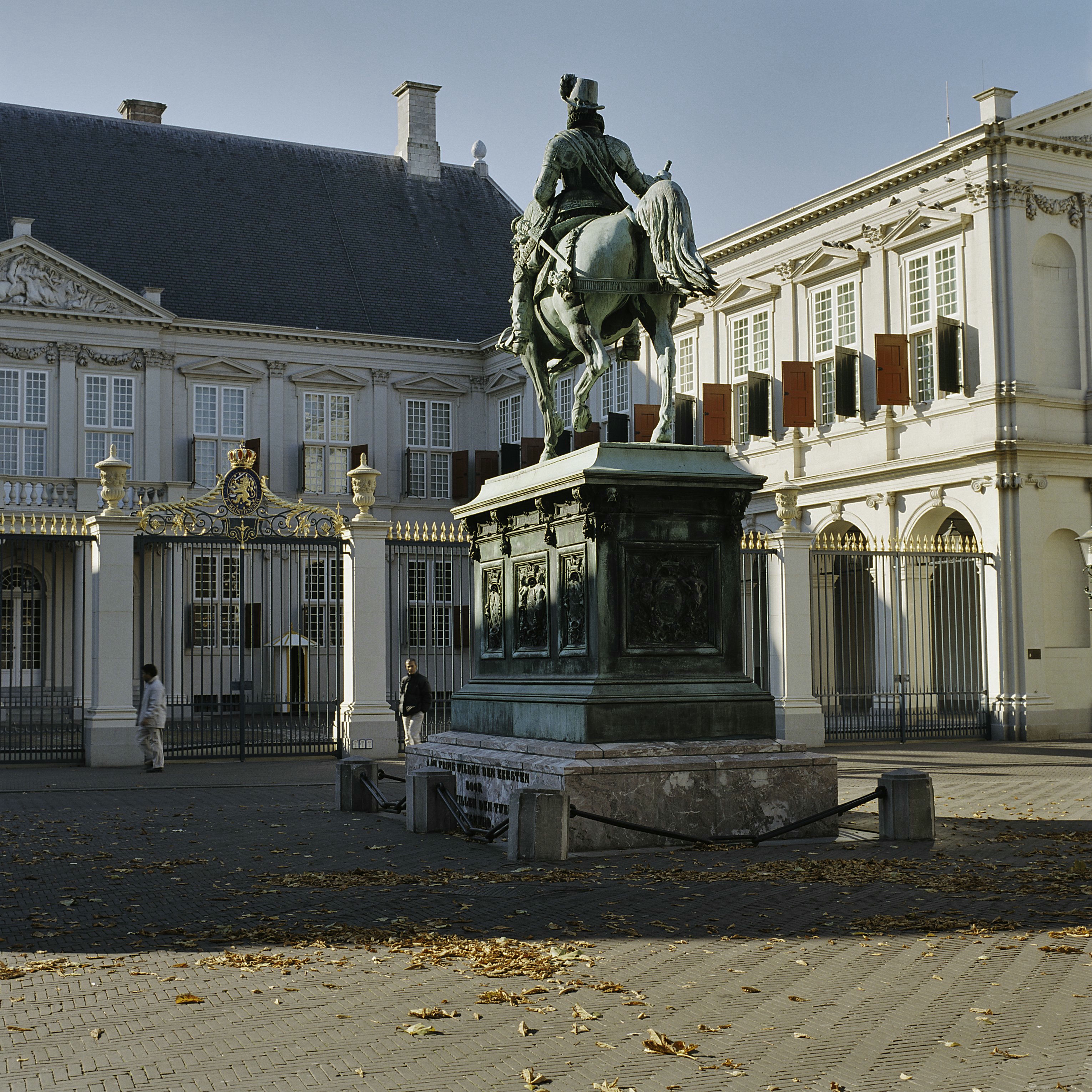 Ruiterstandbeeld Prins Willem I: Overzicht achterzijde standbeeld (opmerking: Gefotografeerd voor Monumenten In Nederland Zuid-Holland)